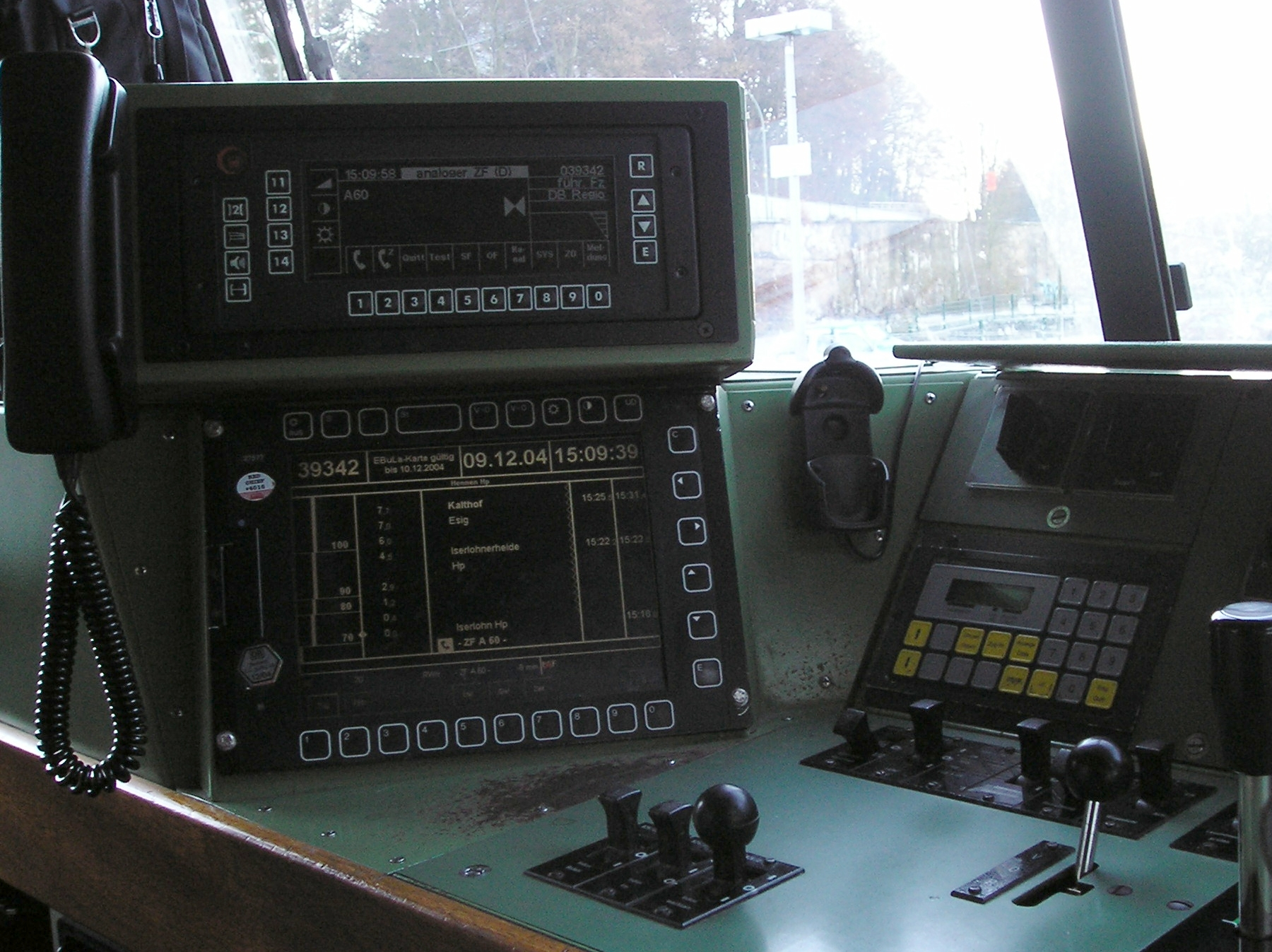 Nachträglich installiertes EBuLa-Gerät im 928 676